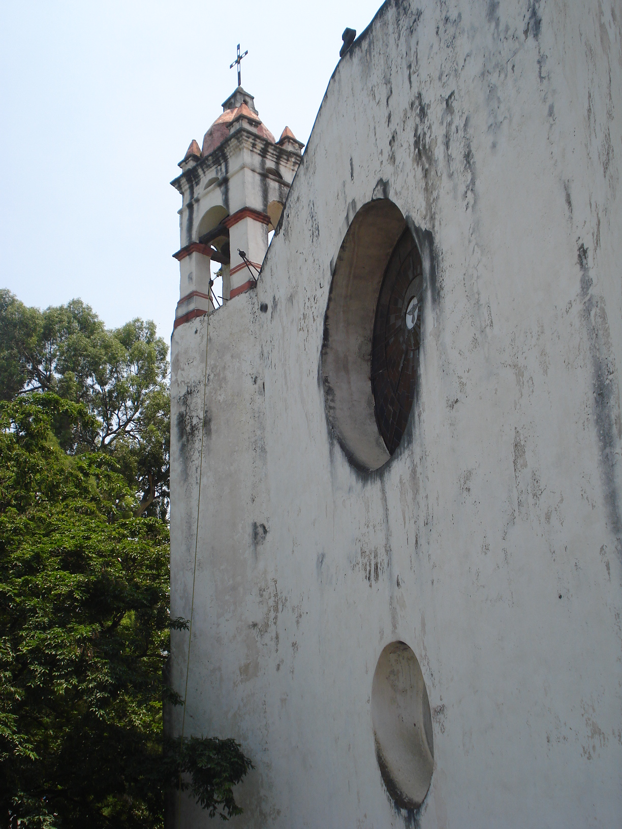 Santo Domingo de German, Oaxtepec, Morelos, Mexico